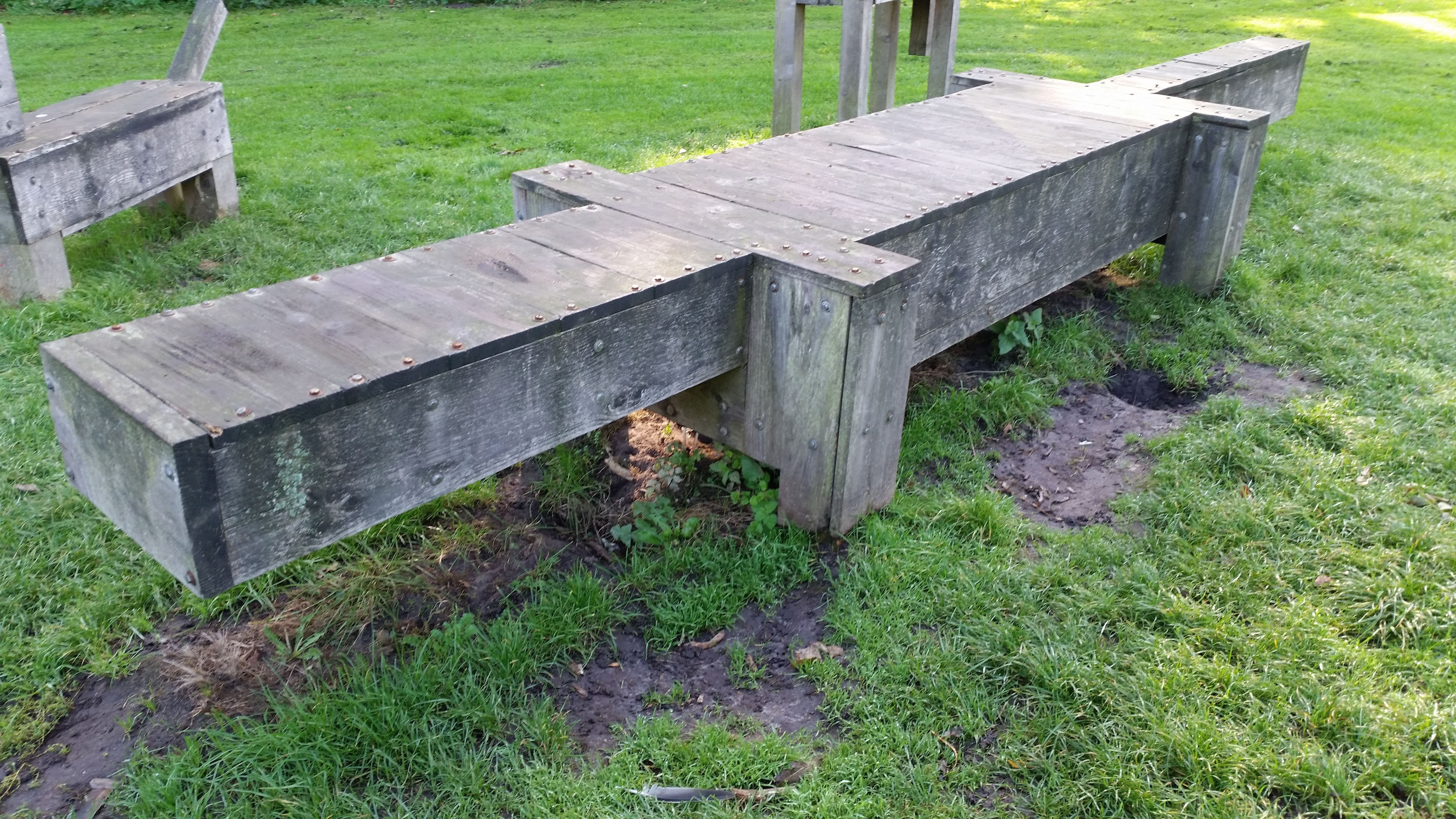 Family Ties; (Verwantschappen) krokodil uit de beeldengroep